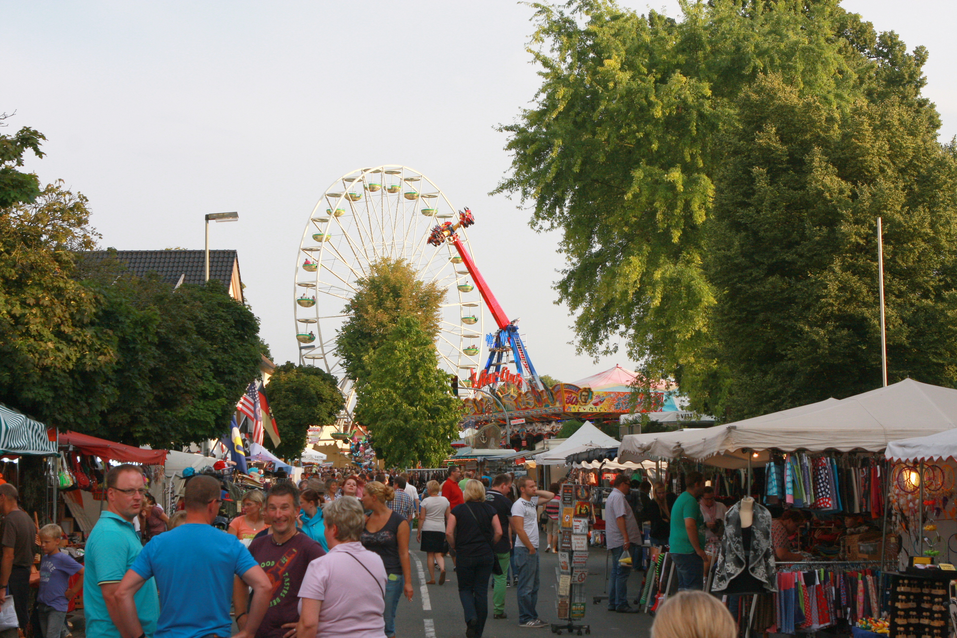 Annentag in Brakel im August 2014.